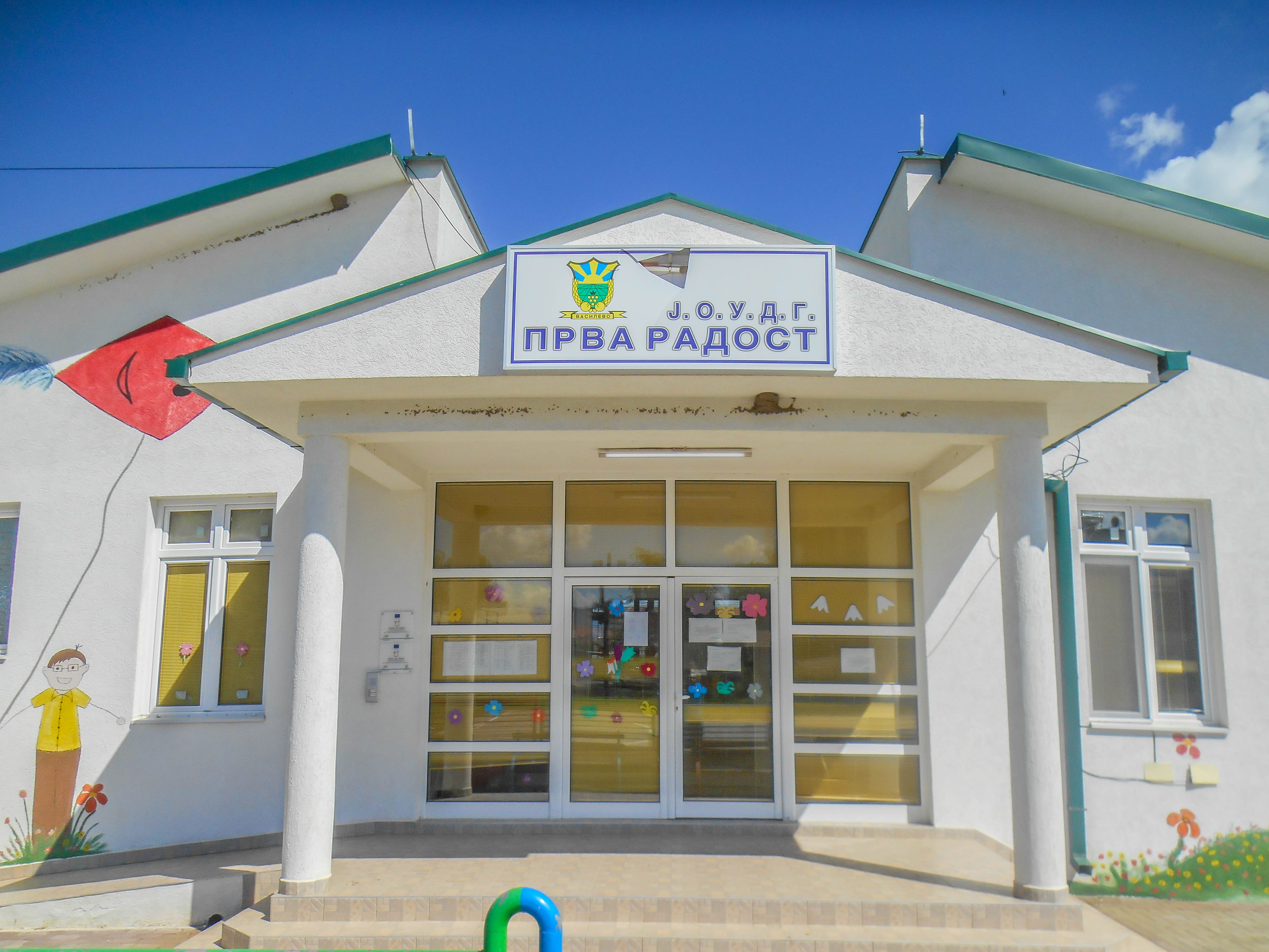 Детска градинка - Василево